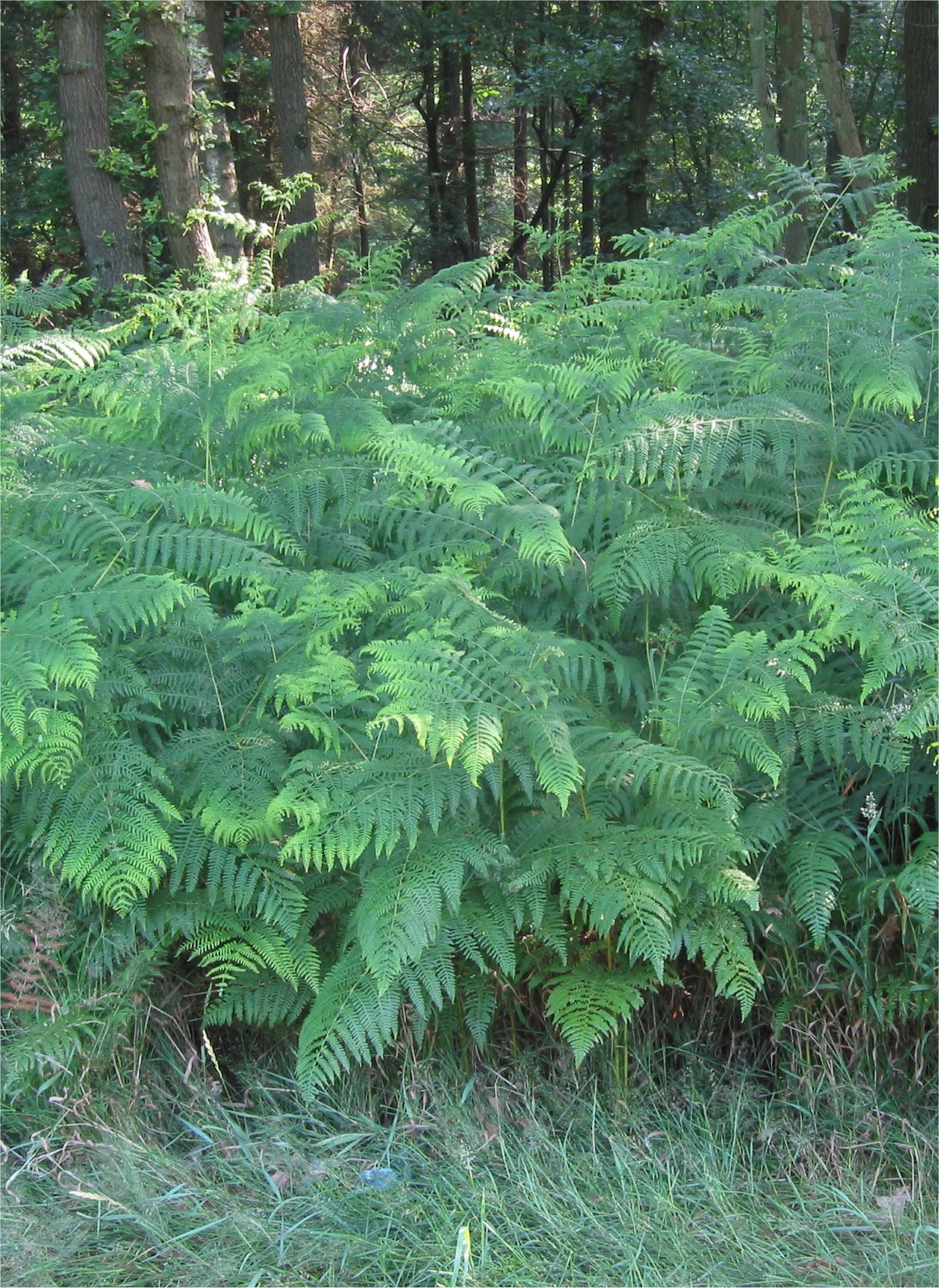 (nl: Adelaarsvaren planten) Pteridium aquilinum